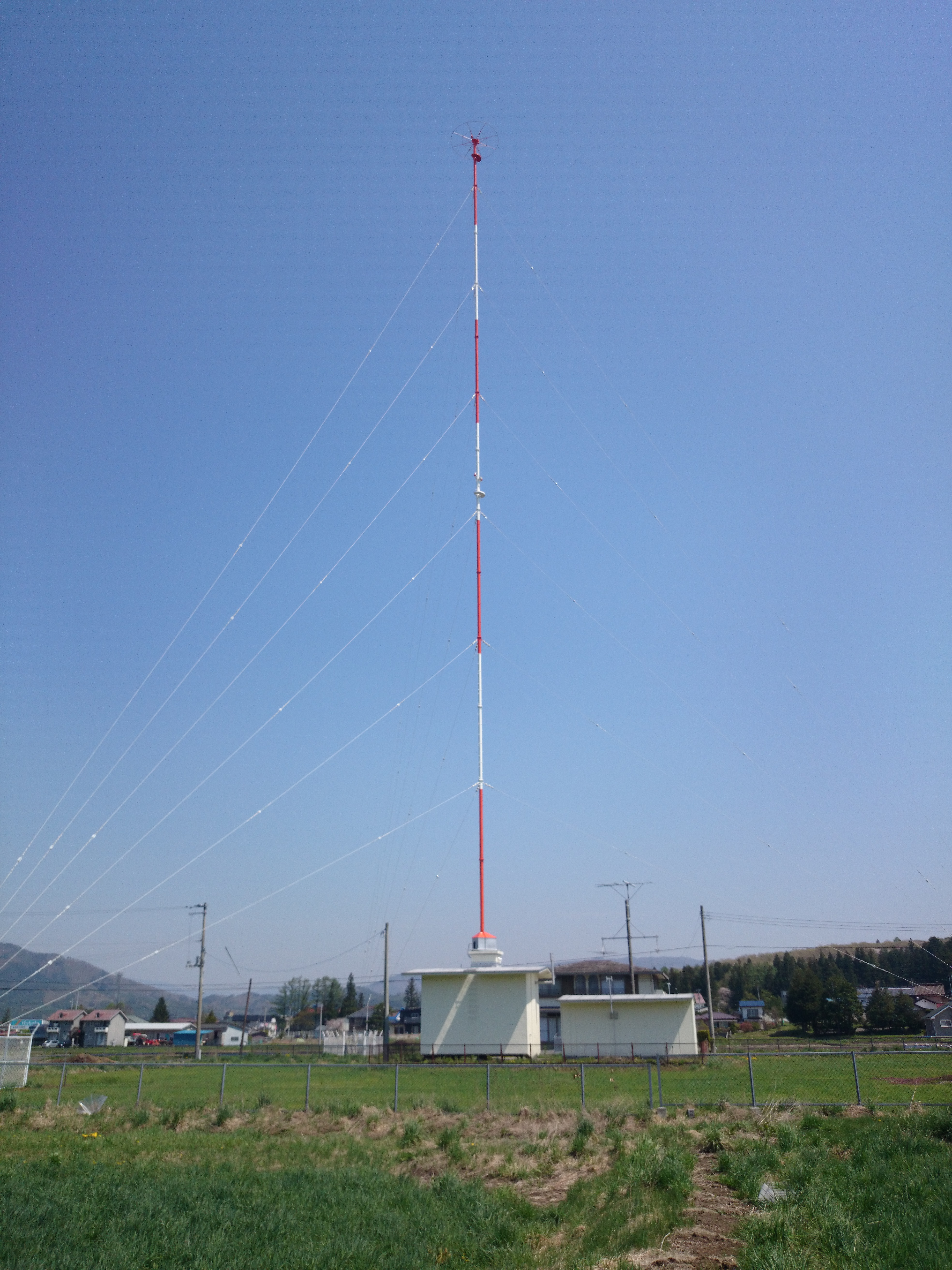 NHK遠野送信所２